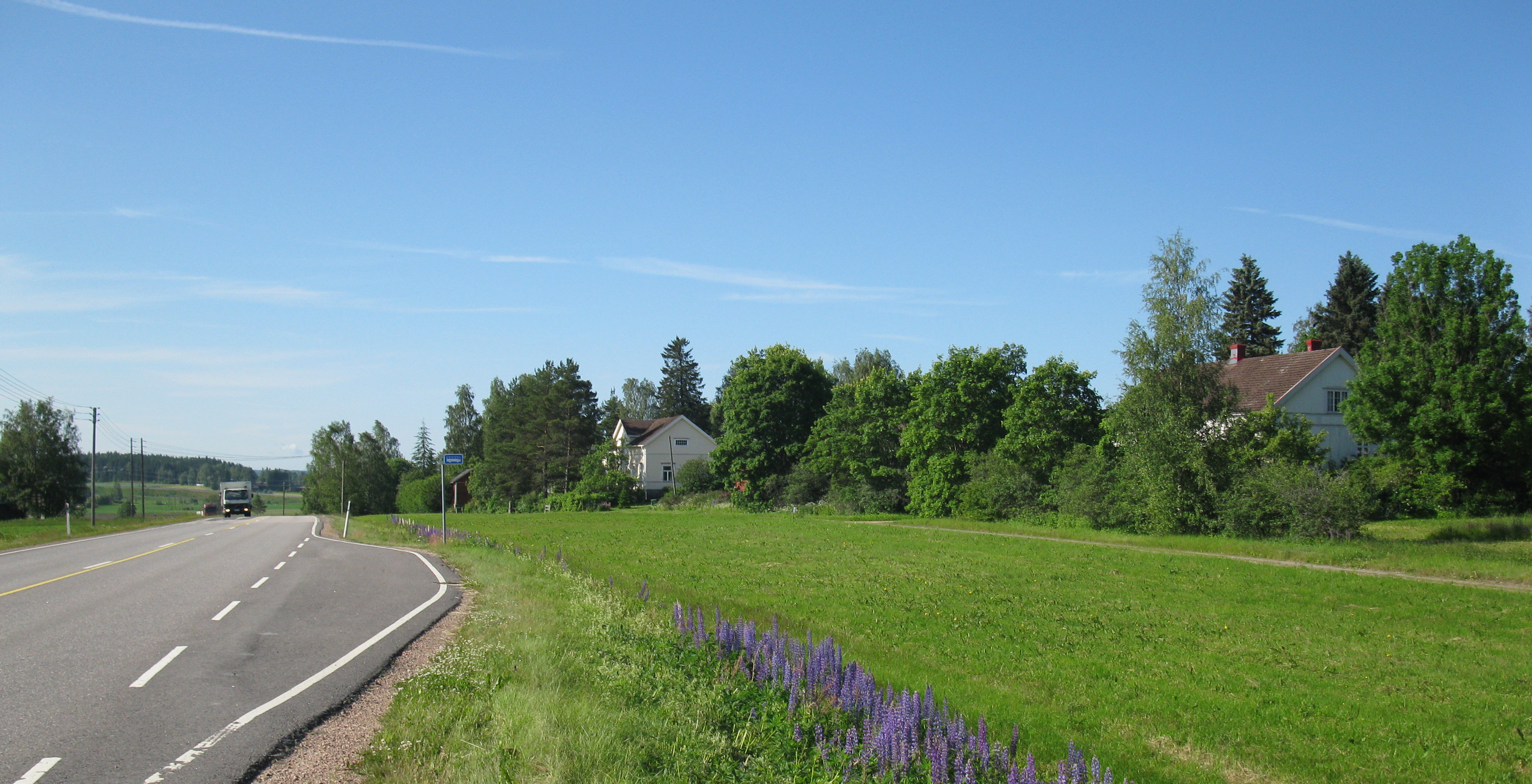 Kiikalan Yltäkylän historiallista kylätonttia Salossa. Talot oikealla Yli-Lääppä, vasemmalla Ali Kriipi.